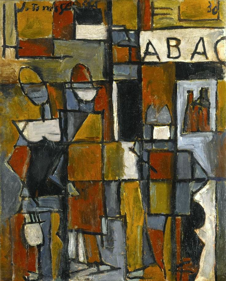 Joaquín Torres García - Figuras sobre uma estrutura, 1930. Óleo sobre tela sobre fibra de cimento. Obra da Cid Collection, sob guarda provisória do Museu de Arte Contemporânea da USP determinação da 2ª Vara de Falências e Recuperações Judiciais do Estado de São Paulo